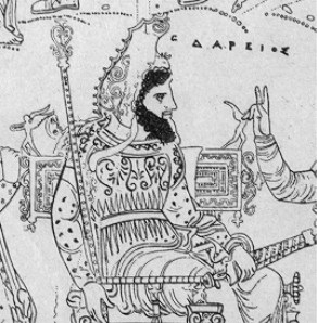 Darío I, rey de los persas